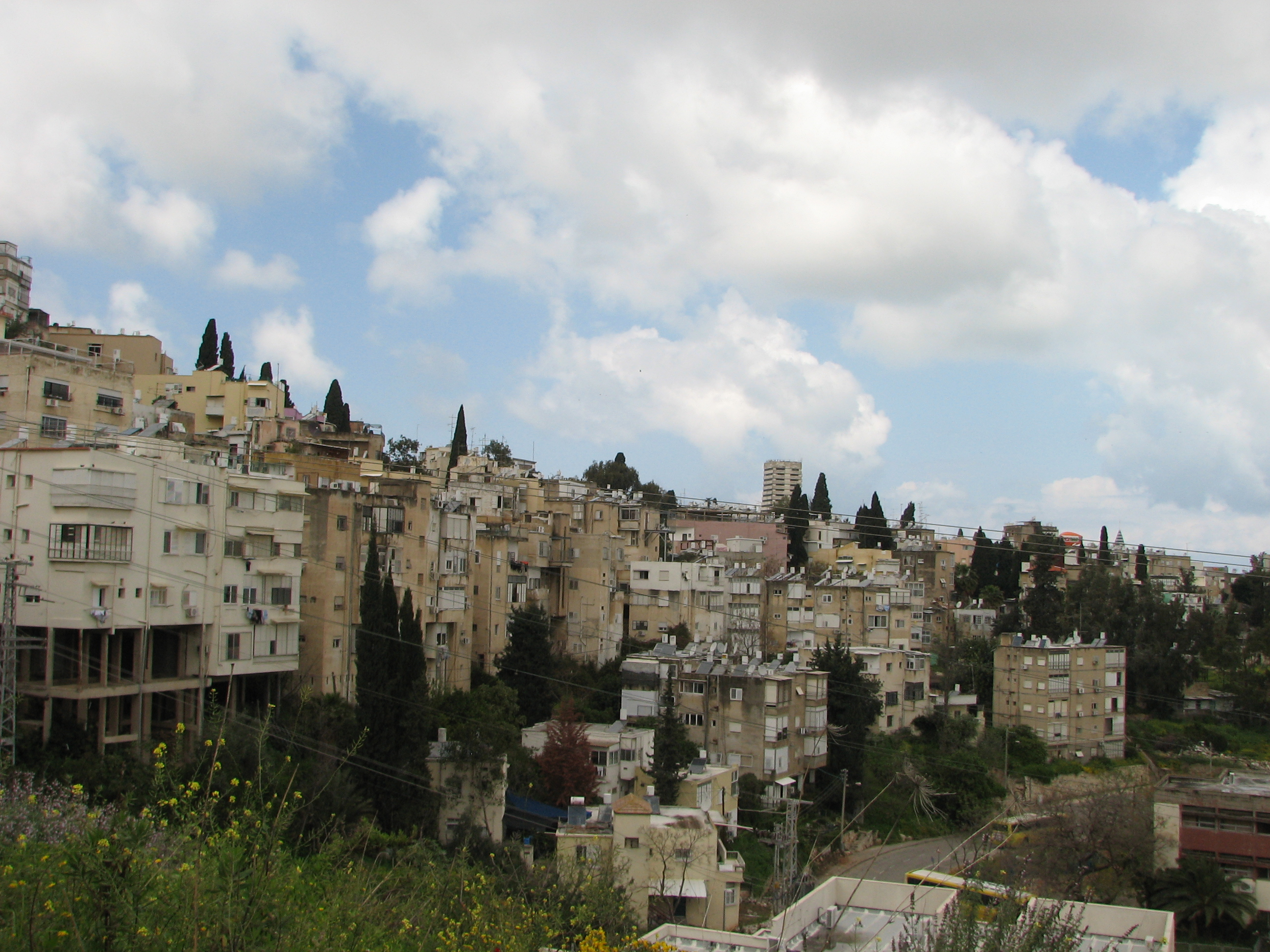 IQuarter Eeast Hadar in Hadar Hacarmel, Haifa Israel רובע הדר מזרח חלק מאזור הדר הכרמל בחיפה. רובע מזרח הדר כולל את השכונות "גאולה, שבתחומה נכללות השכונות ההיסטוריות "נחלה" וגאולה, רמת ויזניץ ואזור יל"ג הכולל את השכונה ההיסטורית "נחלת יהודה" בתי רובע מזרח הדר, אזור רחובות תבור ויכאל. תצפית מתחילת רחוב אהבת ישראל וחיבורות עם רחוב מיכאל